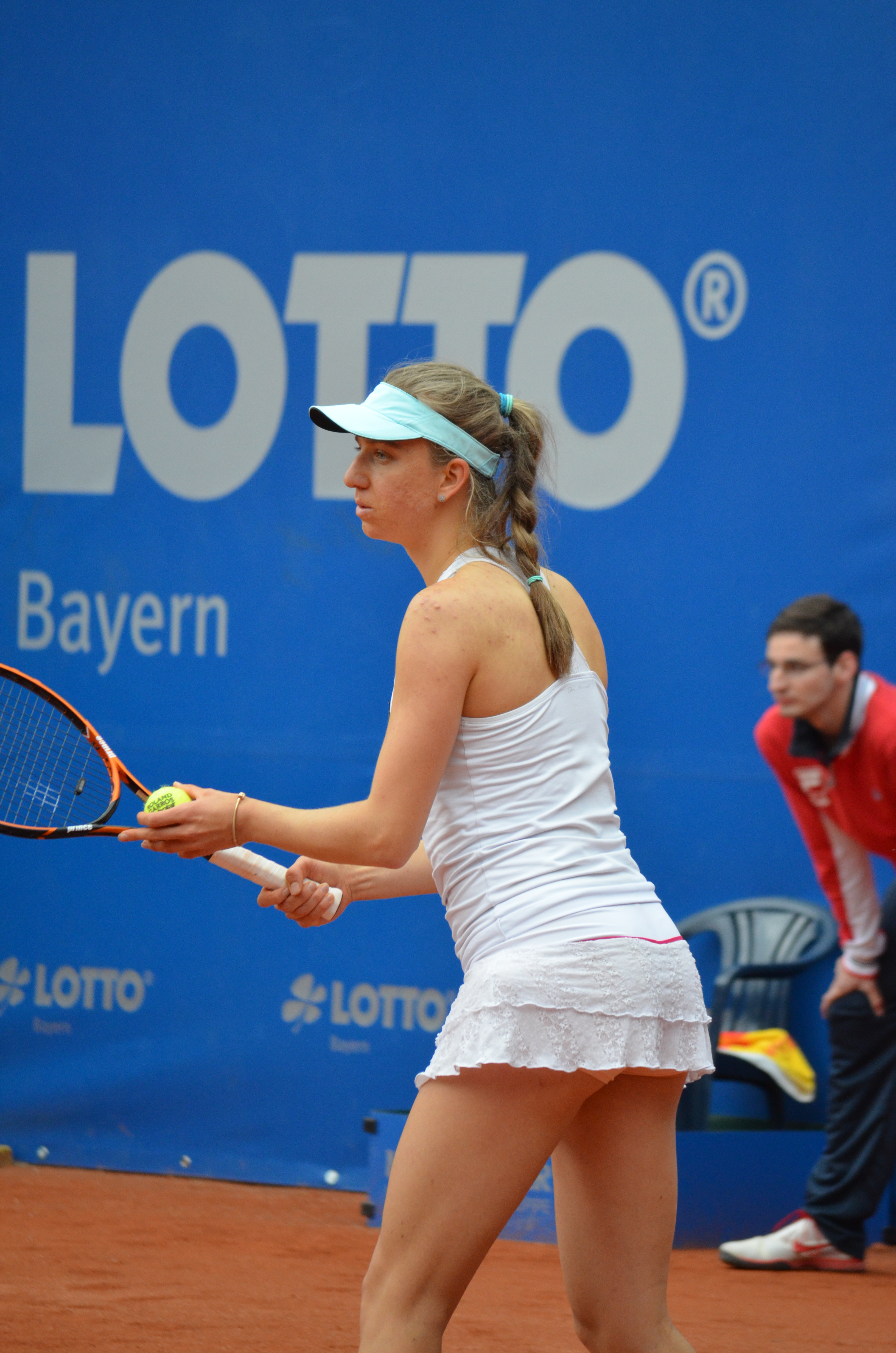 Mona Barthel in der Erstrundenbegegnung gegen Belinda Bencic beim Nürnberger Versicherungscup 2014